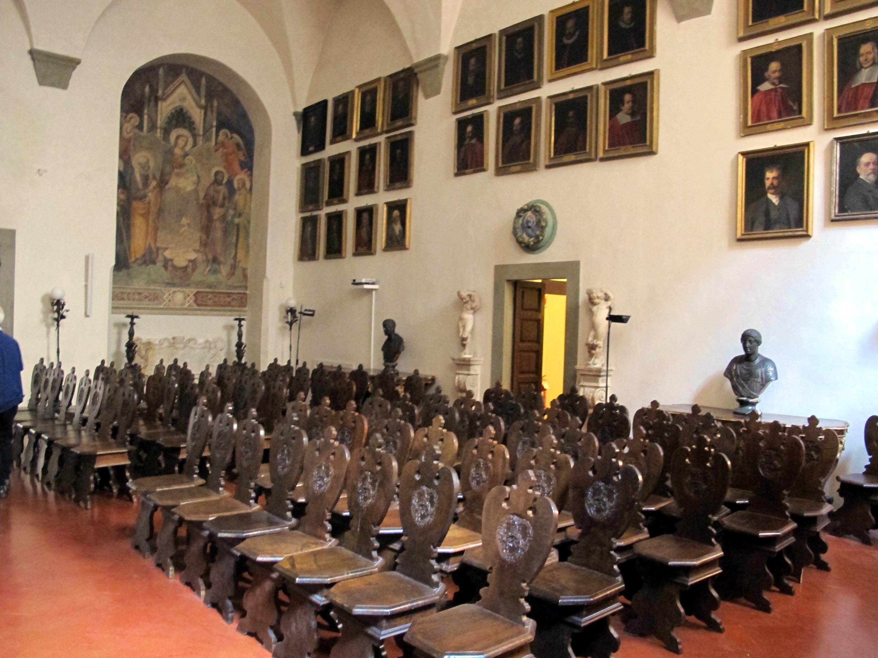 Accademia delle arti del disegno, salone